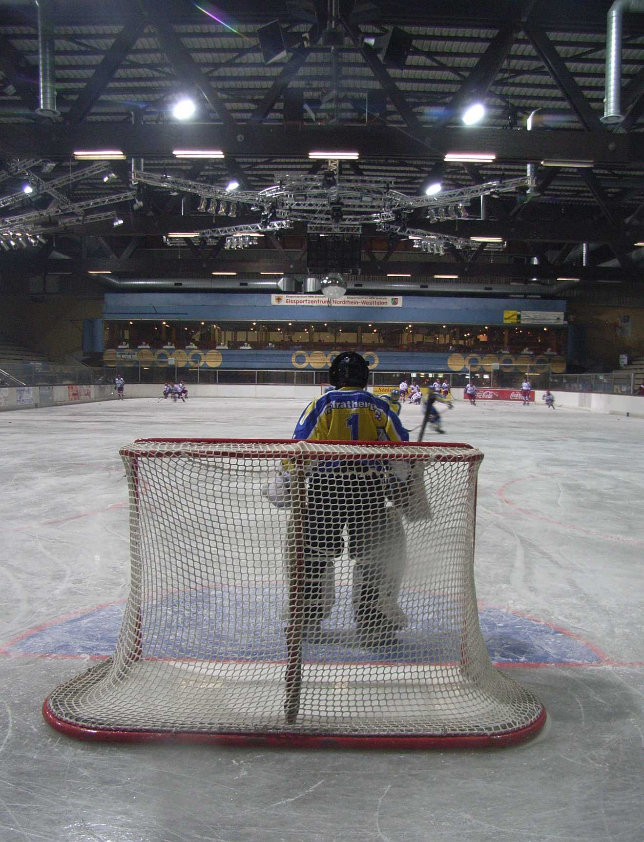 Eissportzentrum Grefrath, NRW, Germany